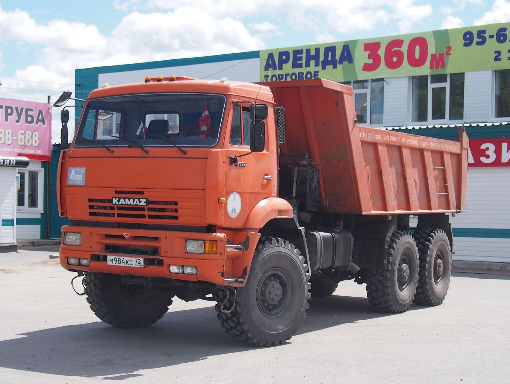 КАМА-65222